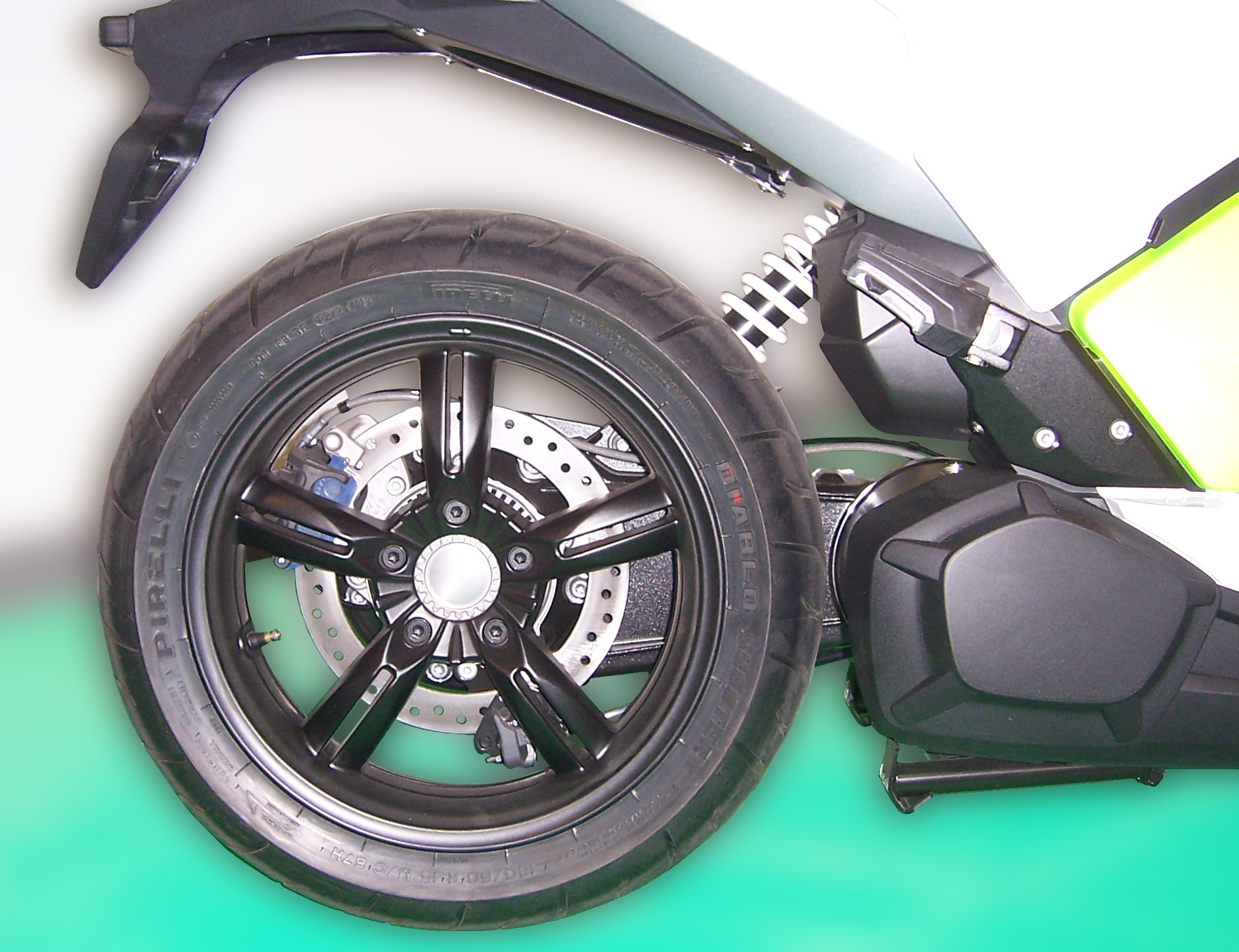 BMW C Evolution am 25. Mai 2014